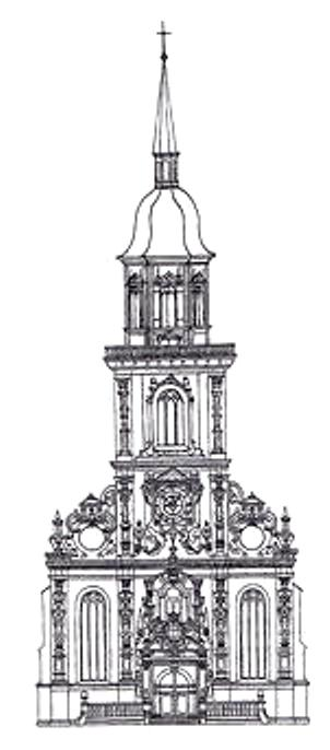 Stadtkirche Bückeburg Originalzeichnung der Fassade mit dem geplanten Turm, 1610